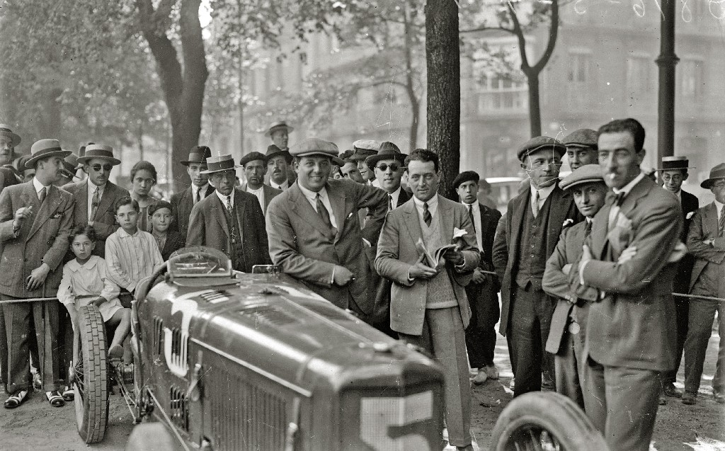 Título original: III Gran Premio Automóvilistico de San Sebastián (1/4) Localización: San Sebastián (Guipúzcoa)